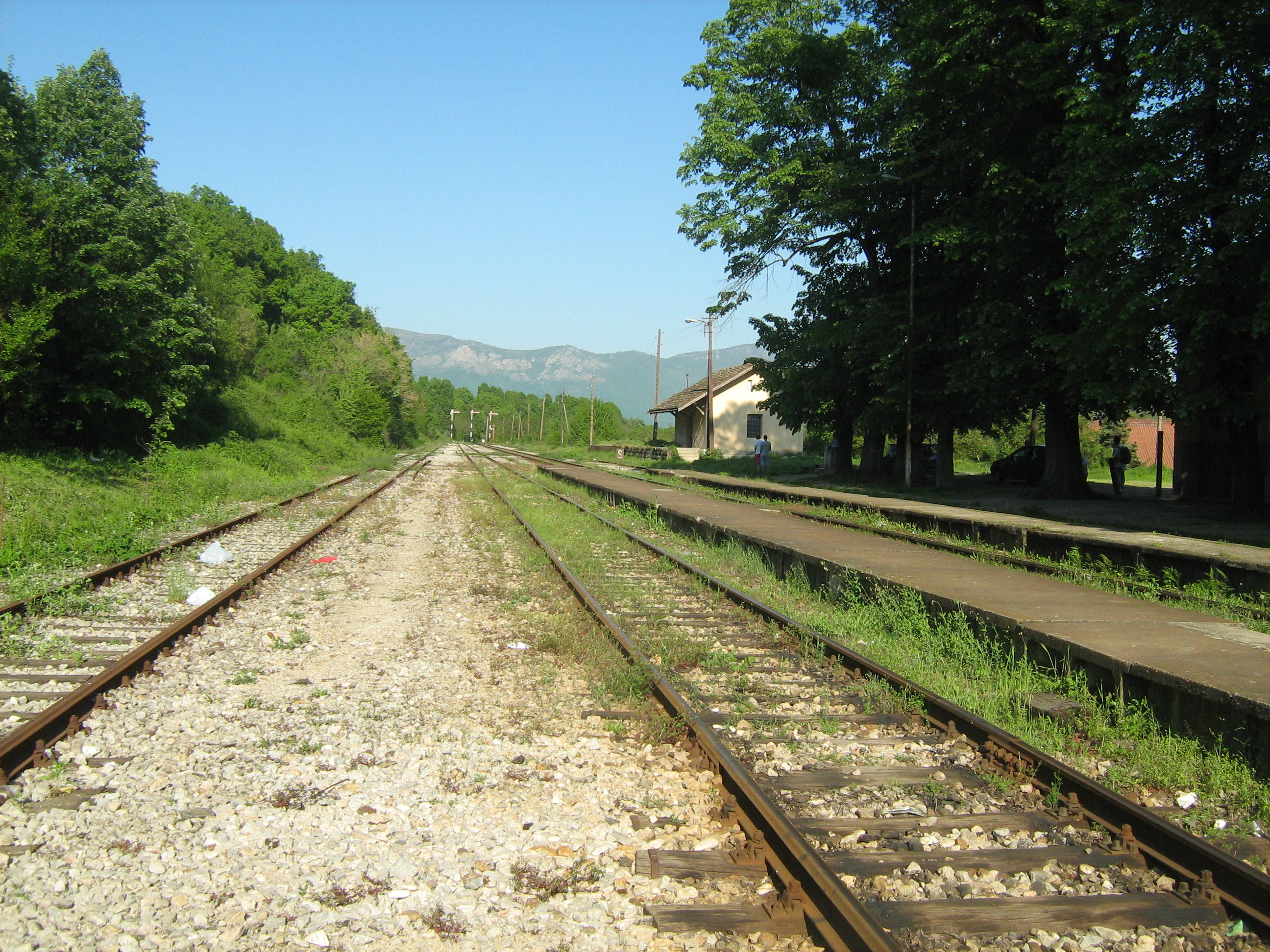 Колосеци на железничката станица во селото Богомила, Република Македонија